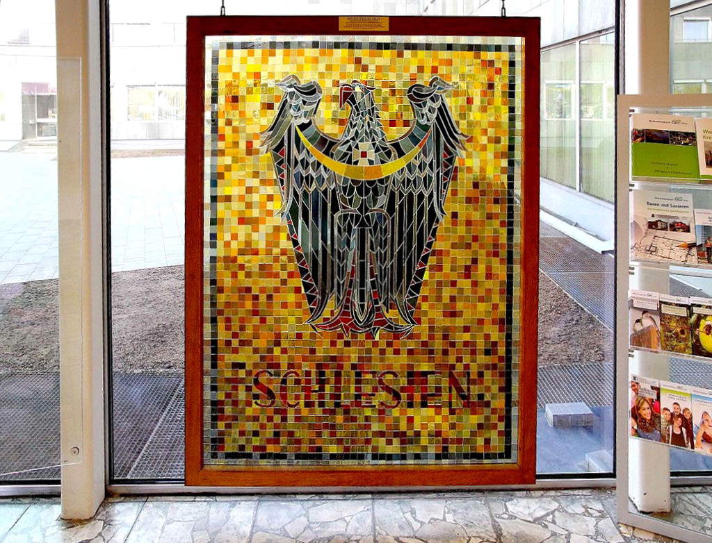 Glasmosaik des Schlesischen Adlers im Kreishaus des Rheinisch Bergischen Kreises, hergestellt von den Süßmuth Glaswerkstätten, früher Penzig, Kreis Görlitz, später Immenhausen, Bez. Kassel